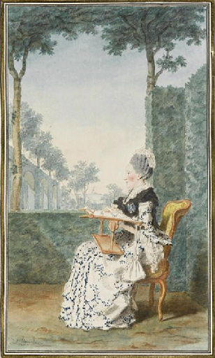 Portrait de Marie Roseline (ou Rossoline) d'Arcy de la Varenne, comtesse de Damas épouse de Claude Mathieu de Damas, dessin de Louis CARROGIS dit CARMONTELLE vers 1770